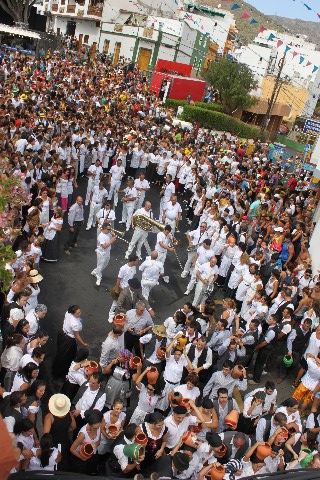 La gente espera delante de la iglesia a que el campanario dé las 12 del mediodía para comenzar la fiesta